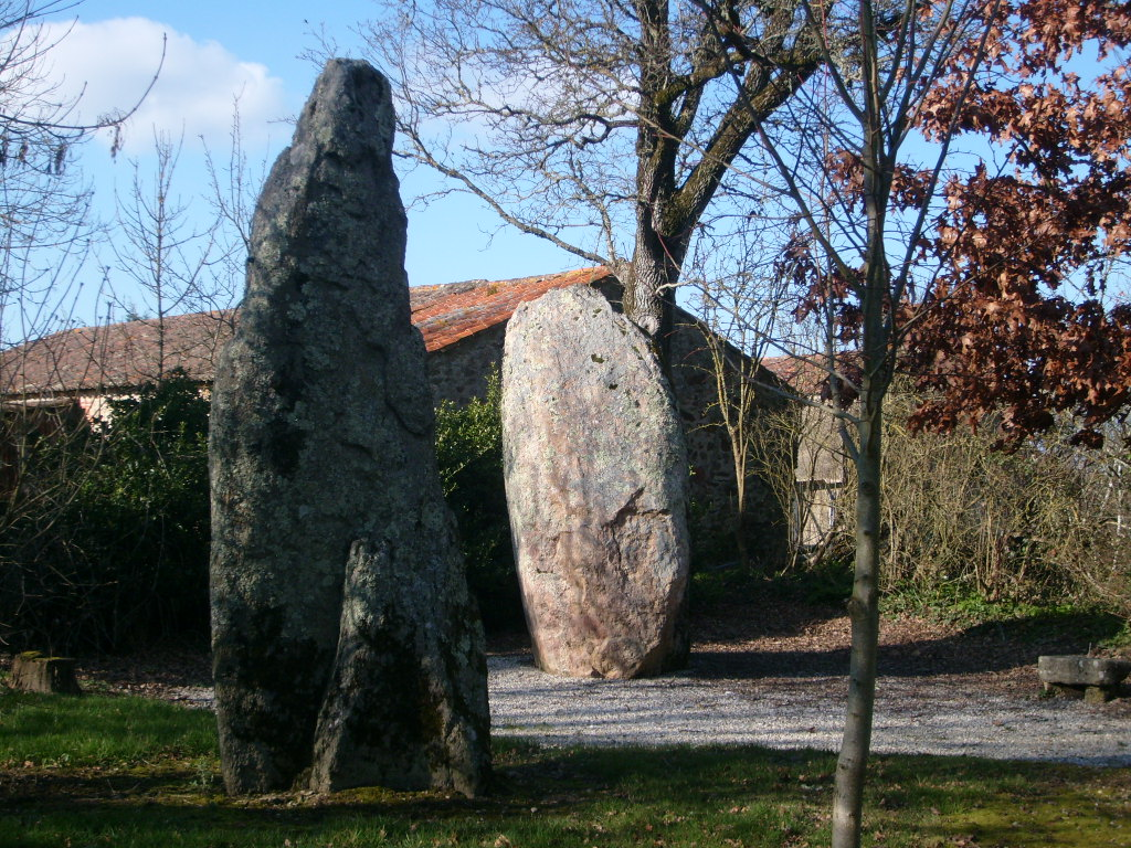 Menhirs jumeaux de Pierre-Levée à Olonne-sur-mer (Vendée).